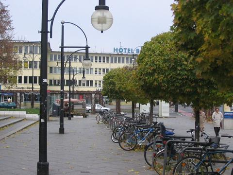 Kurt-Schumacher-Platz in Berlin-Reinickendorf